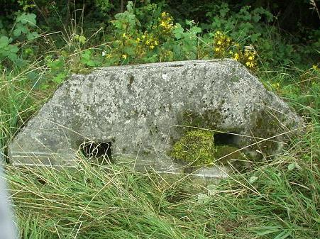 Hinkelstein Truppenübungsplatz Baumholder, Ursprünglich als Streckenbegrenzung für Militärfahrzeuge gedacht.